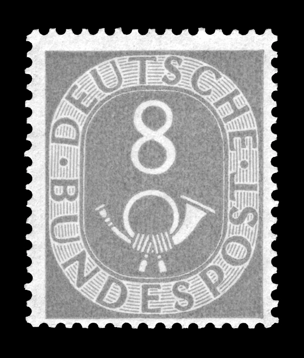 Stamp description / Briefmarkenbeschreibung Posthorn-Serie Ausgabepreis: 8 Pfennig First Day of Issue / Erstausgabetag: 20. September 1951 Michel-Katalog-Nr: 127